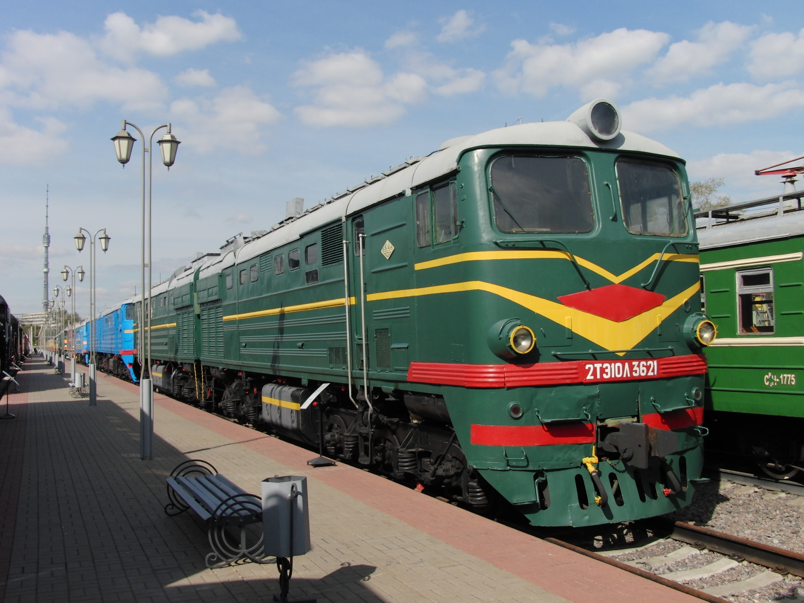 2TE10L (2TЭ10Л) 3621 diesel locomotive